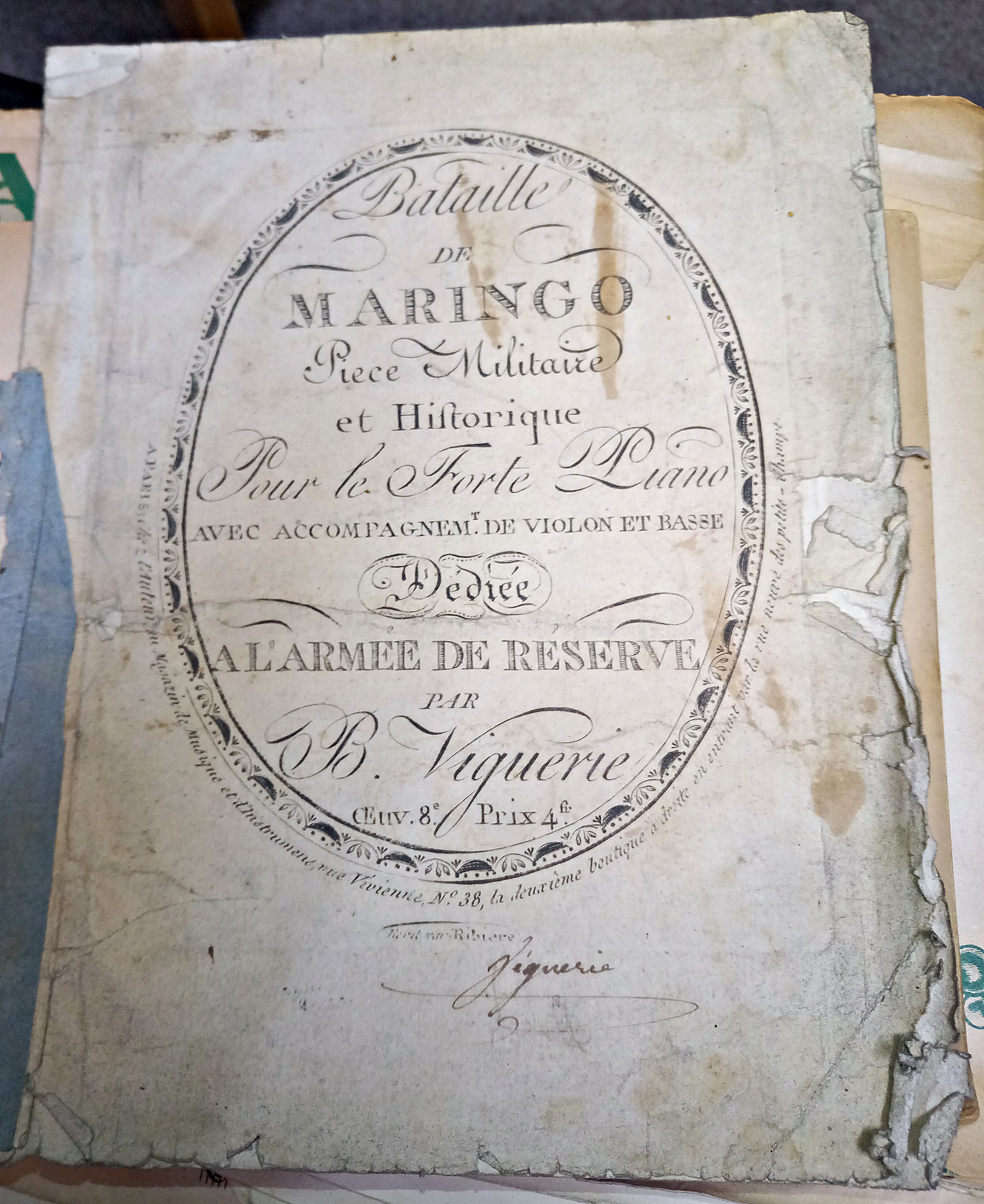 Bernard Viguerie (1761-1819), signiertes Notenblatt zum Musikstück "Bataille de Maringo", 1805, Museum im alten Rathaus Grünstadt